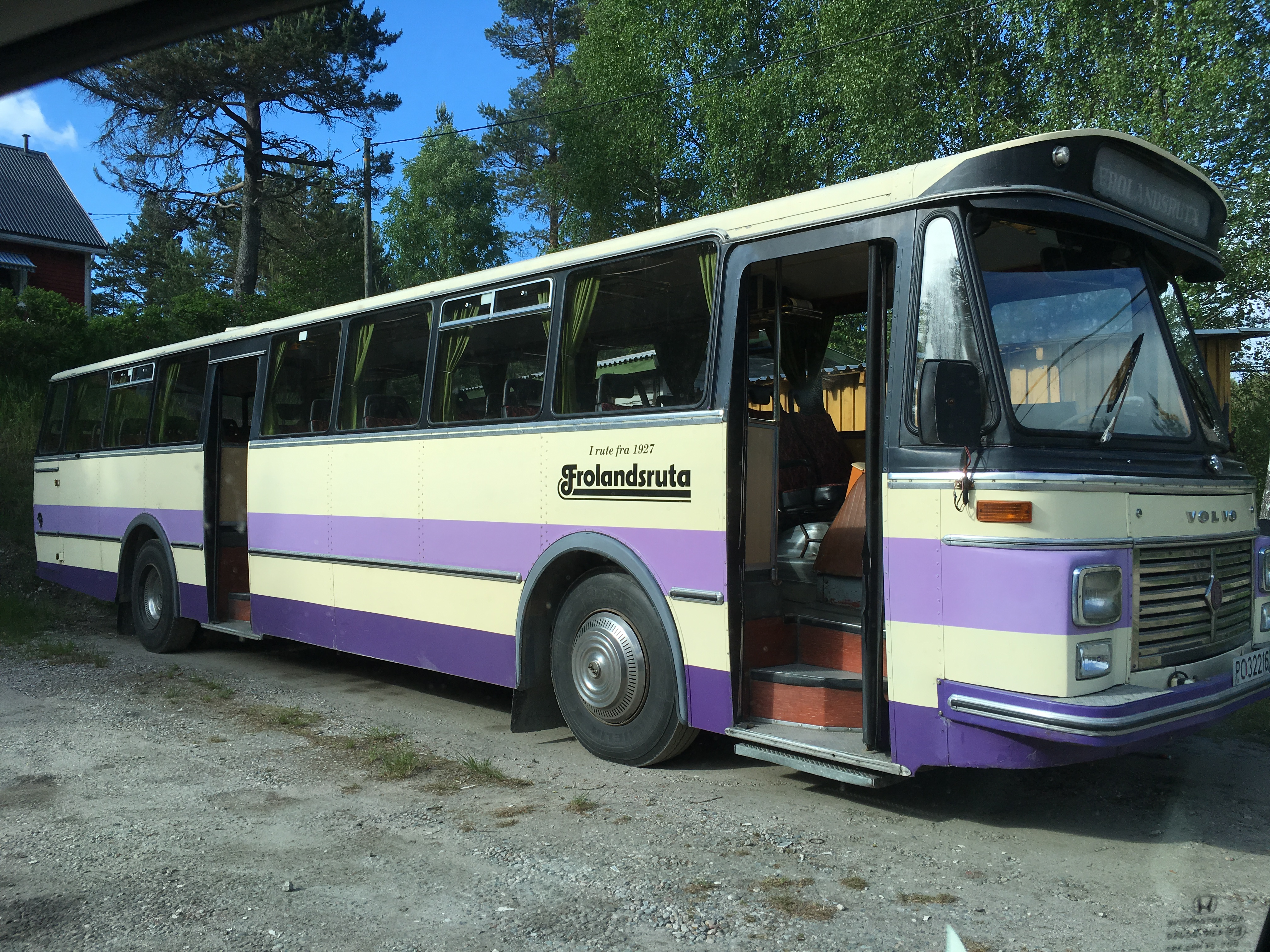 En av bussene til Frolandsruta